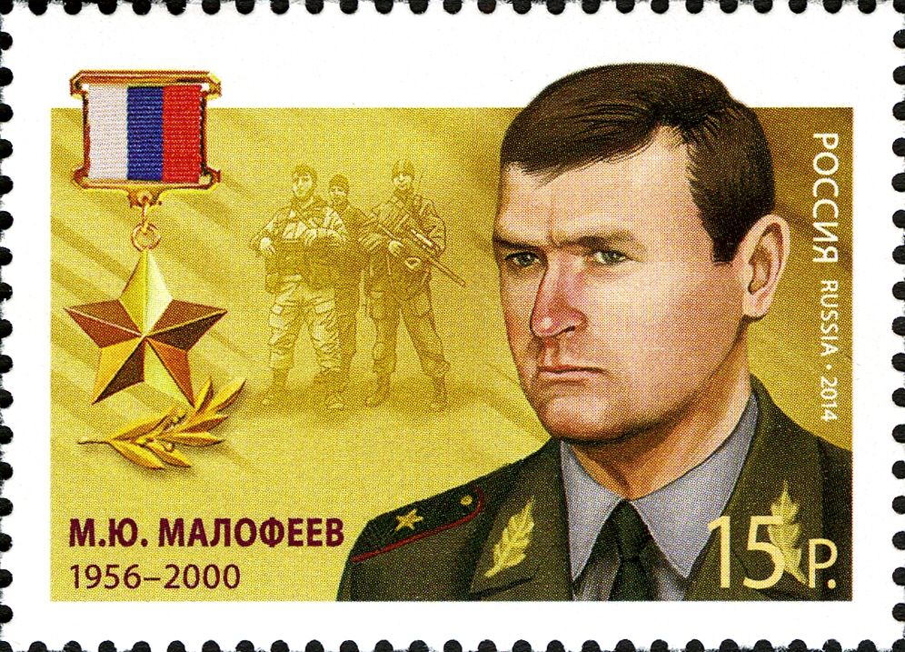 Герои Российской Федерации